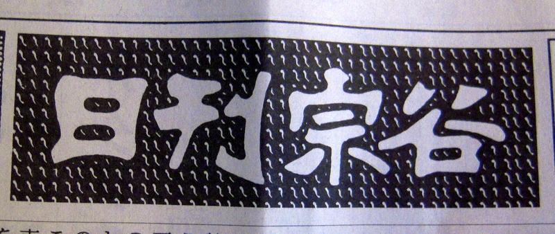 日刊宗谷のタイトルロゴ